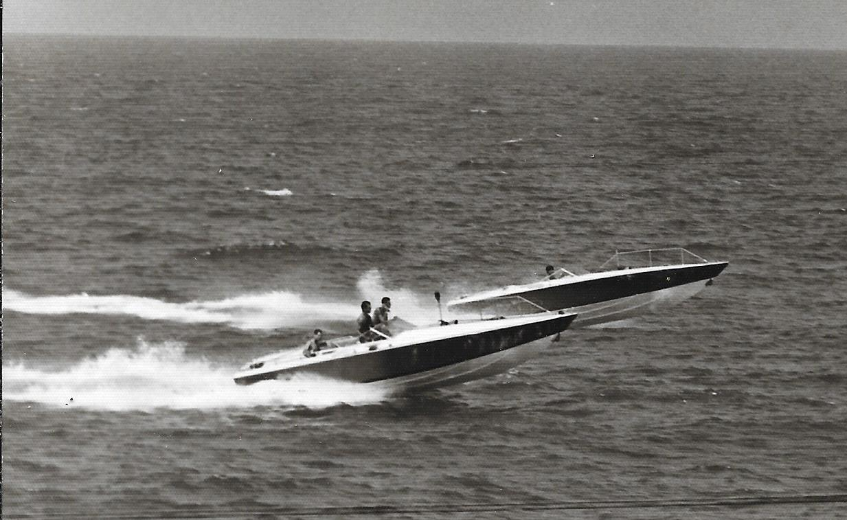 זוג סירות סנונית בתנעה מהירה בתקופת הקליטה